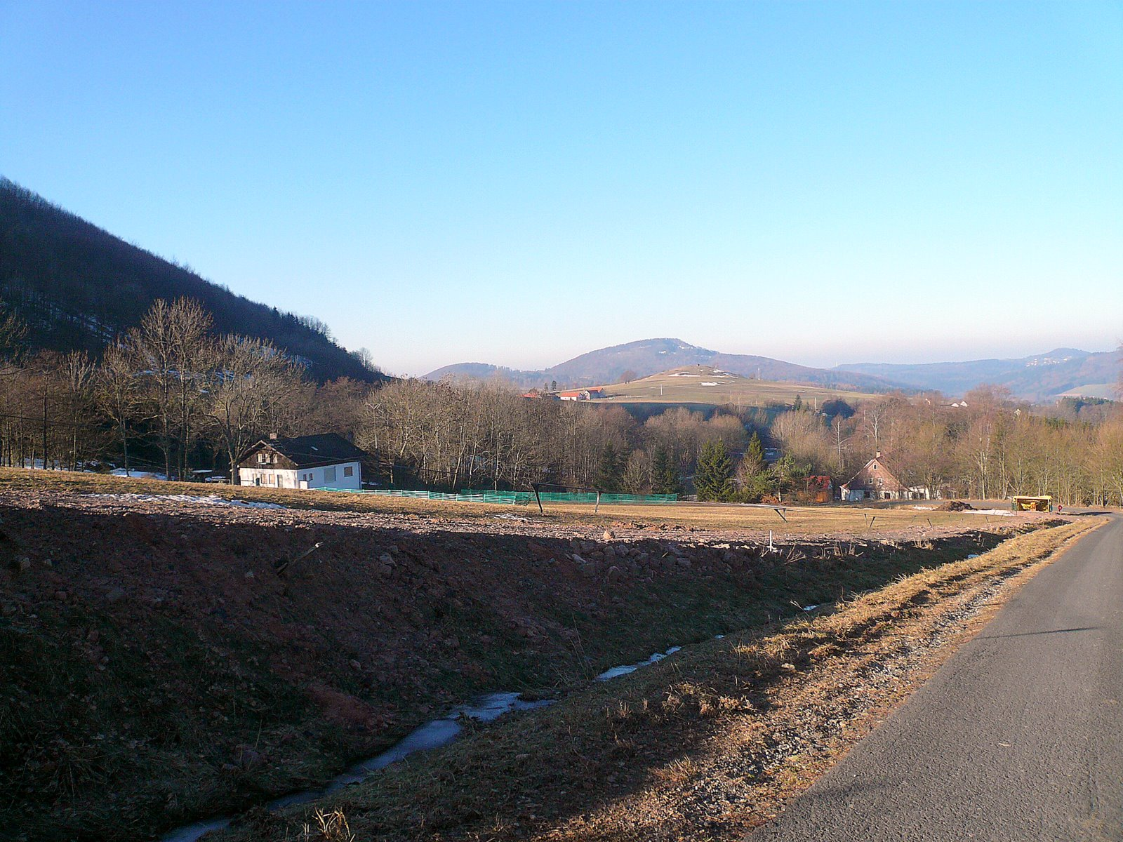 Skizentrum Simmelsberg